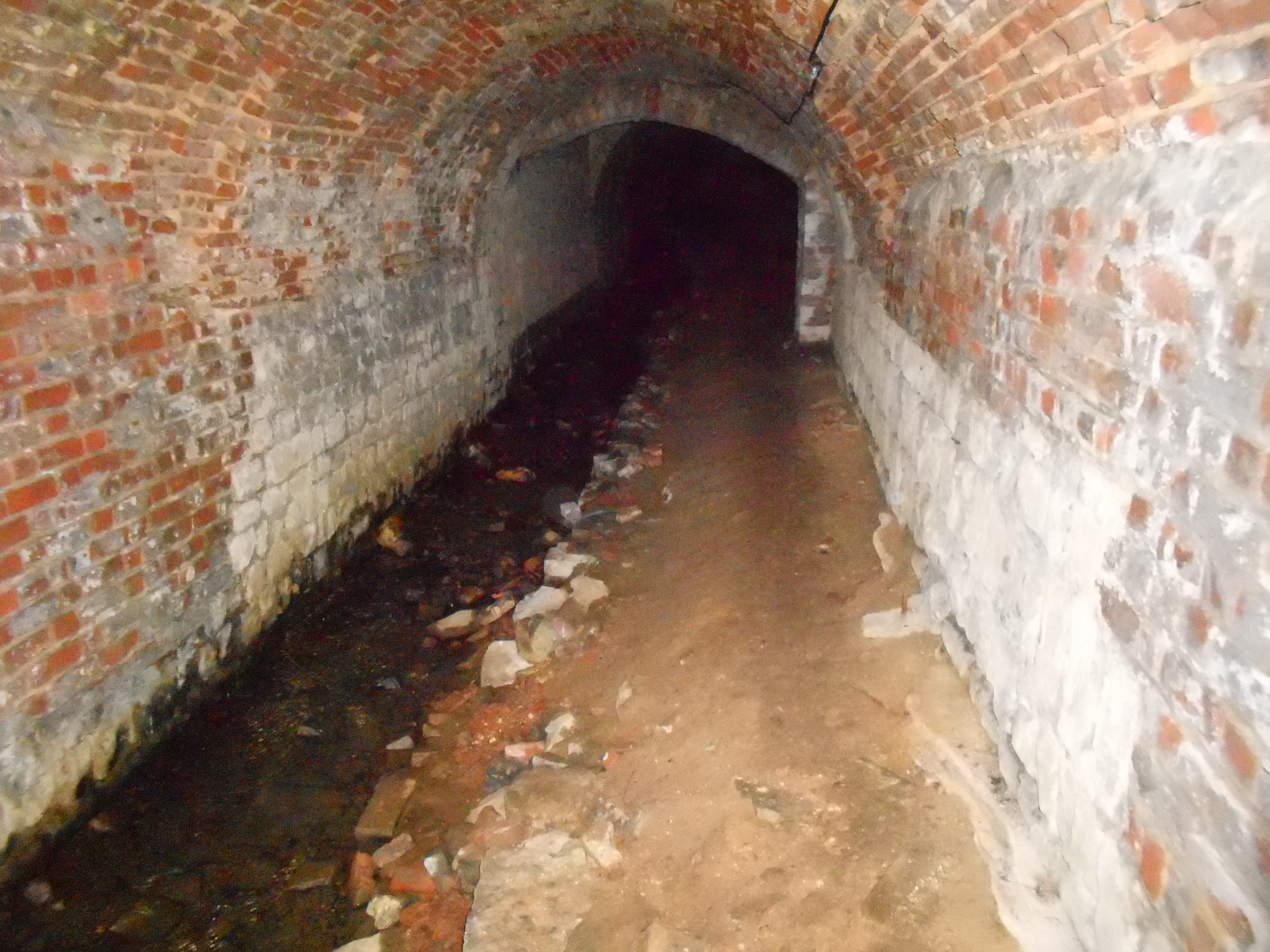 Overwelfde IJse, bij de priorij van Groenendaal (Hoeilaart).